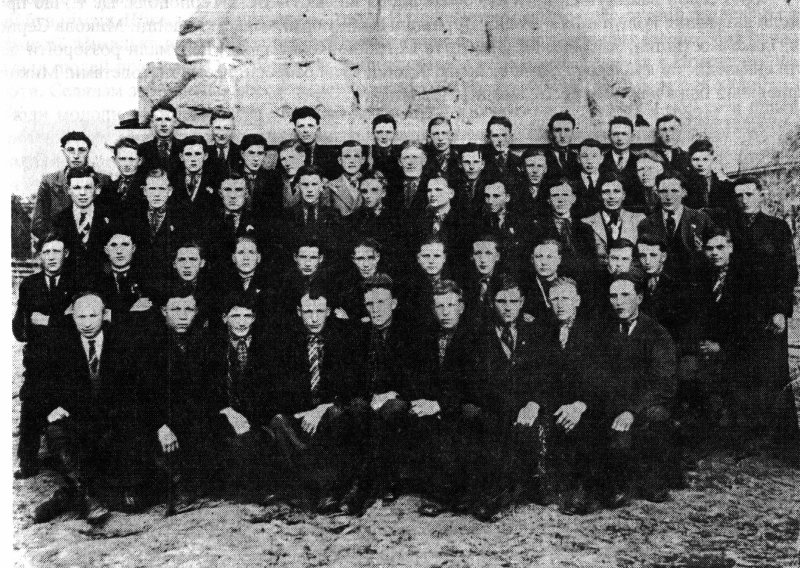 Члени товариства «Луг», згодом члени ОУН